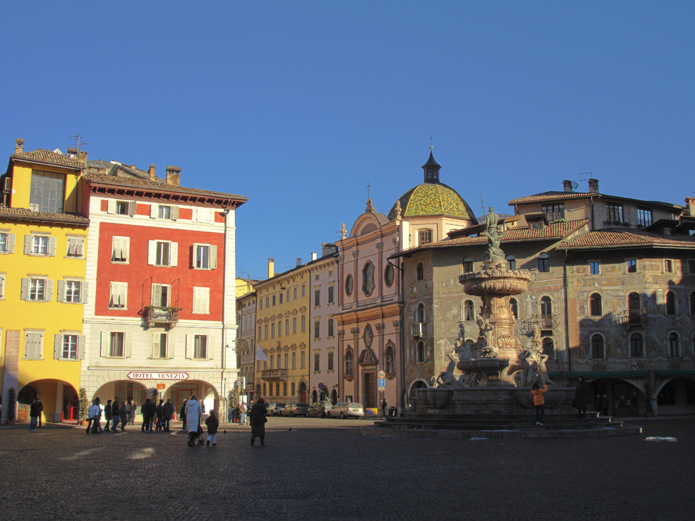 Piazza Duomo, Trento, Trentino-Alto Adige, Italia